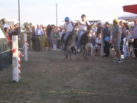 Palio dei Somari 2008 di Montepulciano Stazione (Siena)